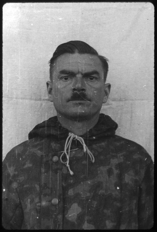 Michael Redwitz (* 14. August 1900 in Bayreuth; † 29. Mai 1946 in Landsberg am Lech) war SS-Hauptsturmführer und Schutzhaftlagerführer in mehreren Konzentrationslagern eingesetzt (u.a. Ravensbrück und Dachau). Er wurde am 13. Dezember 1945 im Dachau-Hauptprozess zum Tode verurteilt.